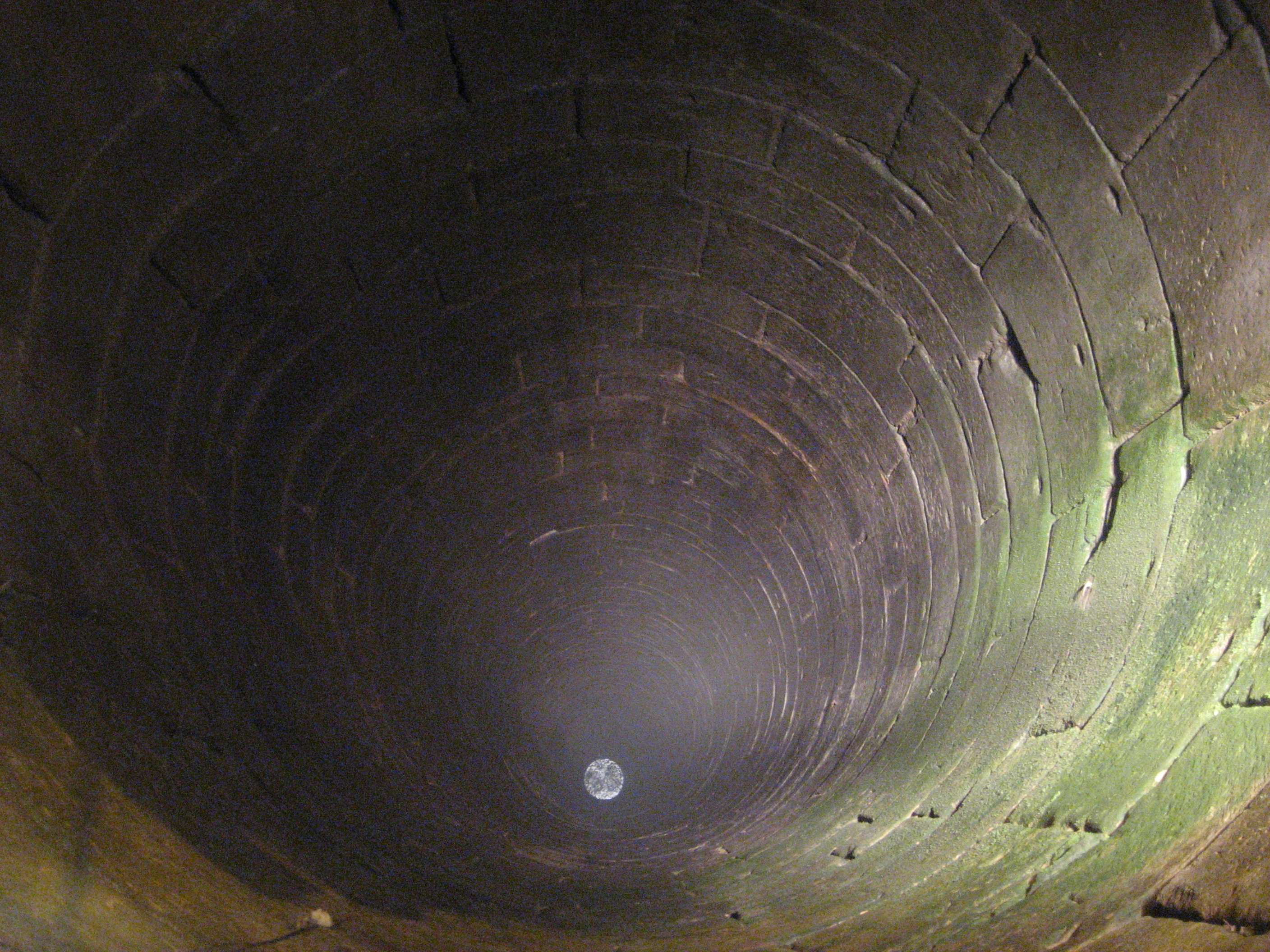 Brunnenschacht auf der Ronneburg, Hessen, Deutschland